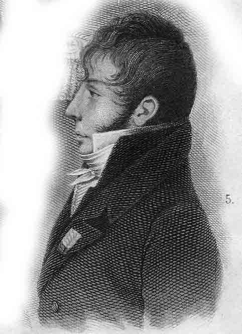 Carl Otto Mörner (1871-1868)